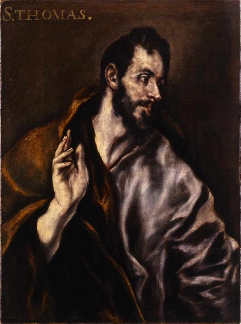 La obra representa a Santo Tomás Apóstol.